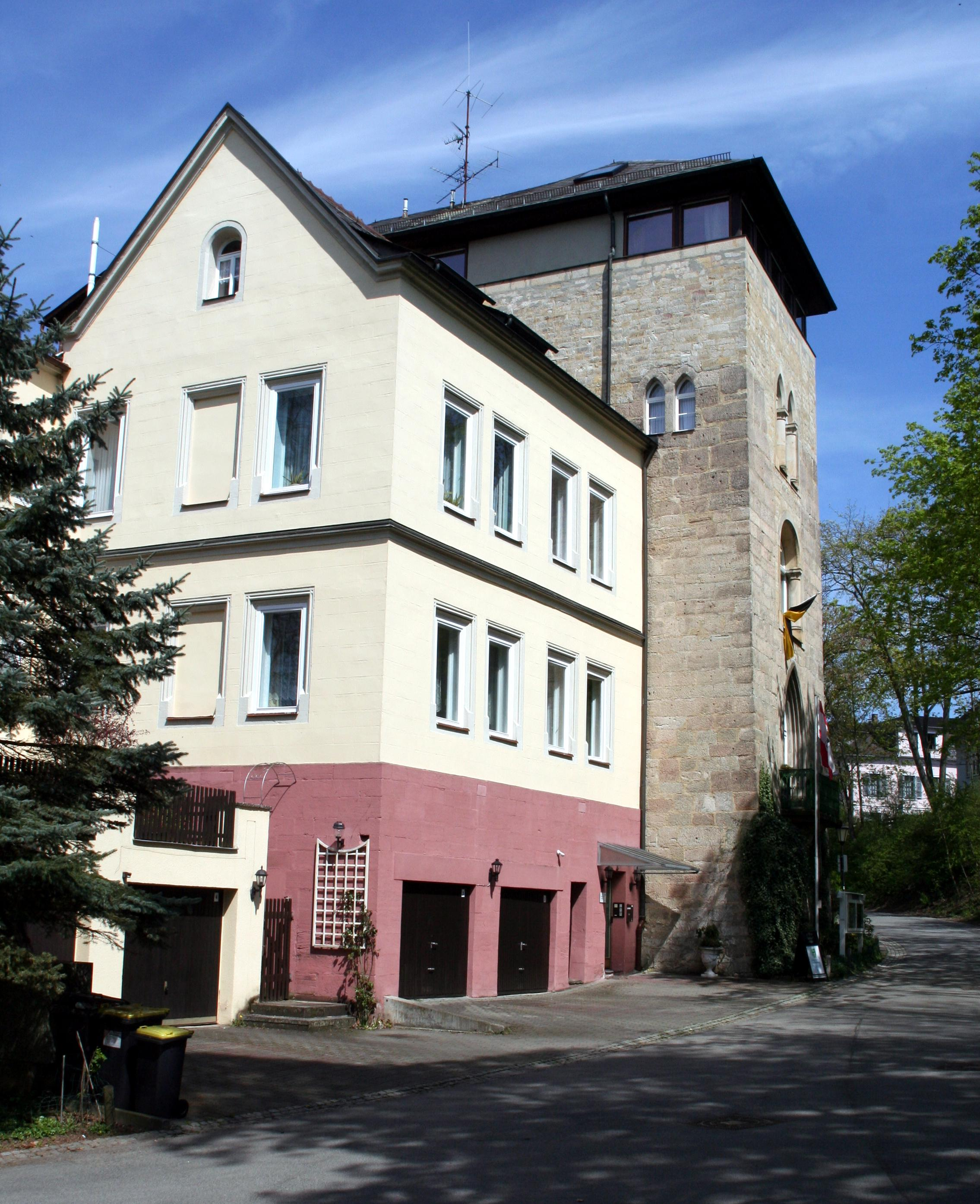 Untere Anlage 2, der Bärenturm, in Coburg